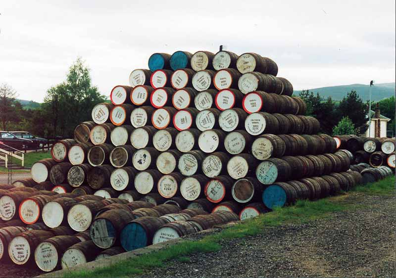 Whiskyfässer, Schottland 1983.